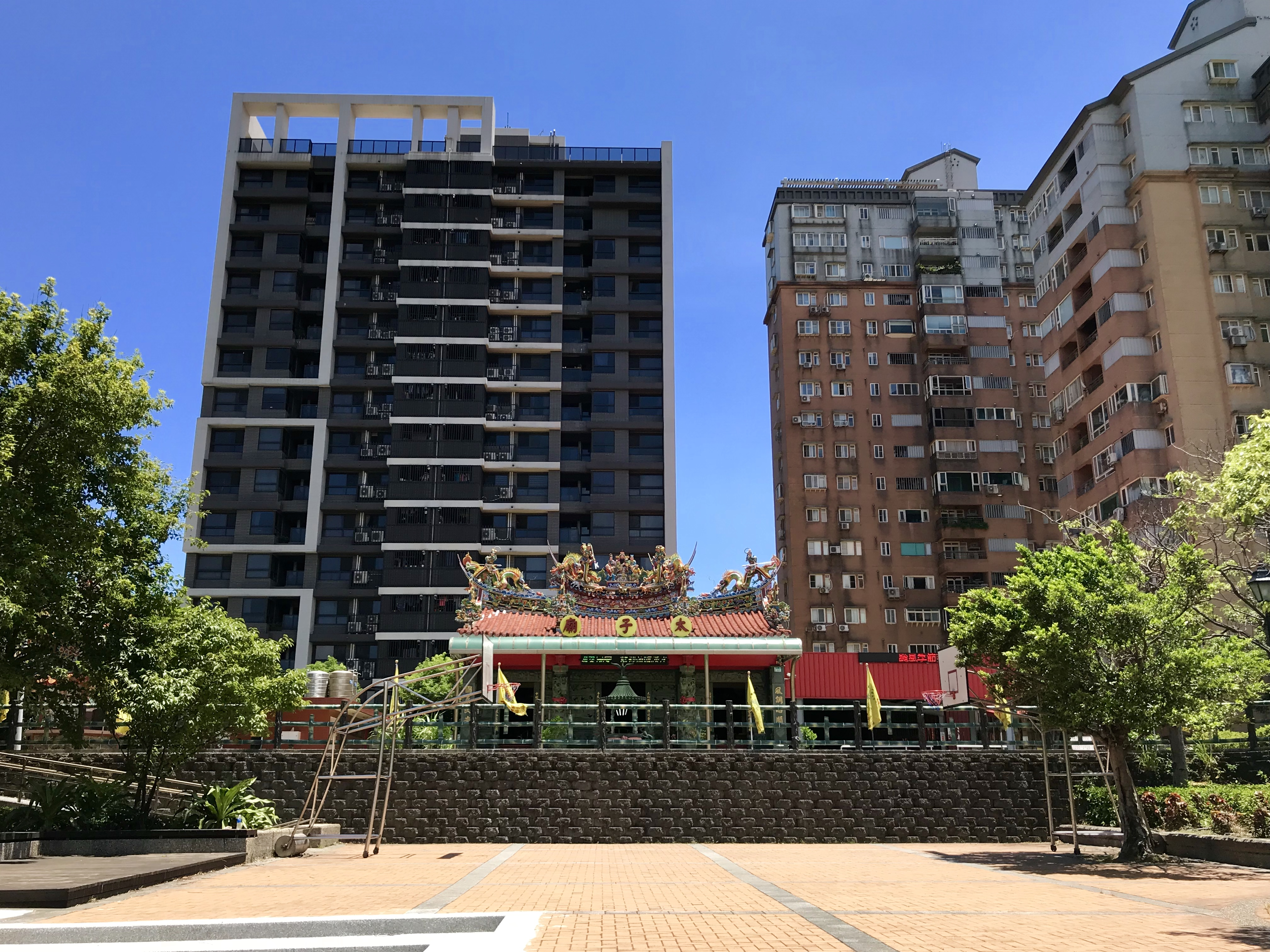 中文（台灣）: 淡水太子廟遠照